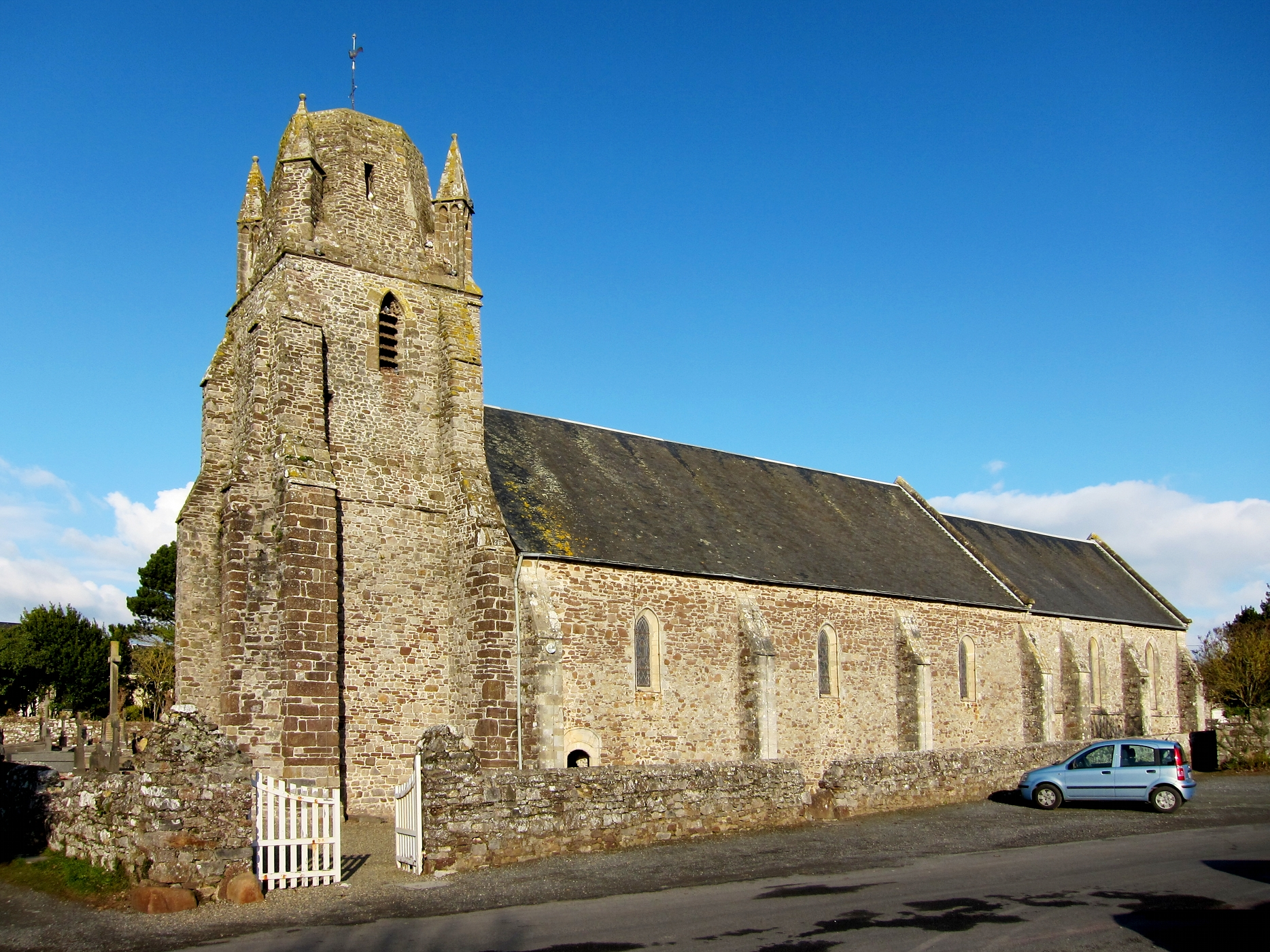 L'église de Regnéville-sur-Mer (Manche).